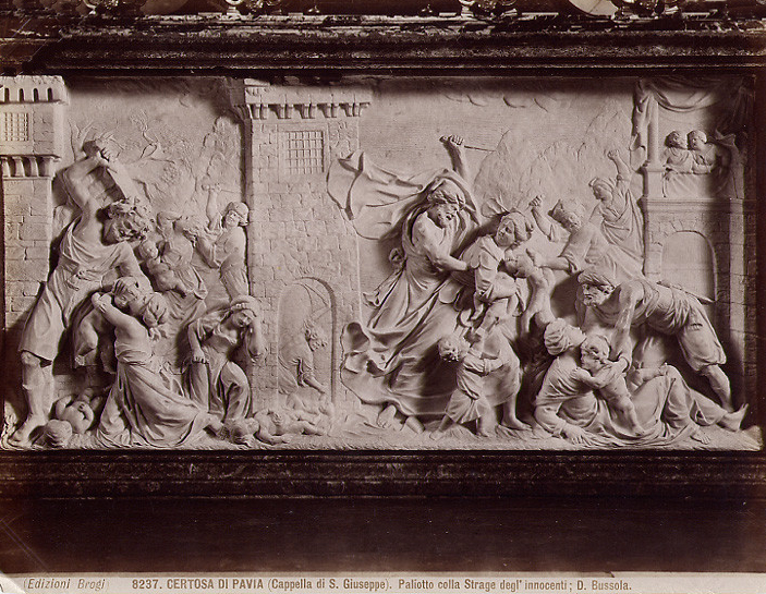 Brogi, Carlo (1850-1925), "Certosa di Pavia - (Cappella di S. Giuseppe) - Paliotto colla strage degl'Innocenti; D. Bussola. Numero di catalogo: 8237.